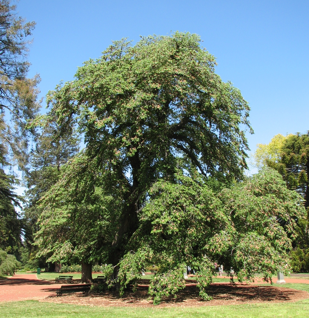 Ulmus glabra 'Horizontalis' (syn. U. glabra 'Pendula') in Ballarat Botanic Gardens, Australia.